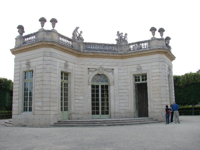 Pavilhão de festas no domínio de Maria Antonieta, em Versailles.